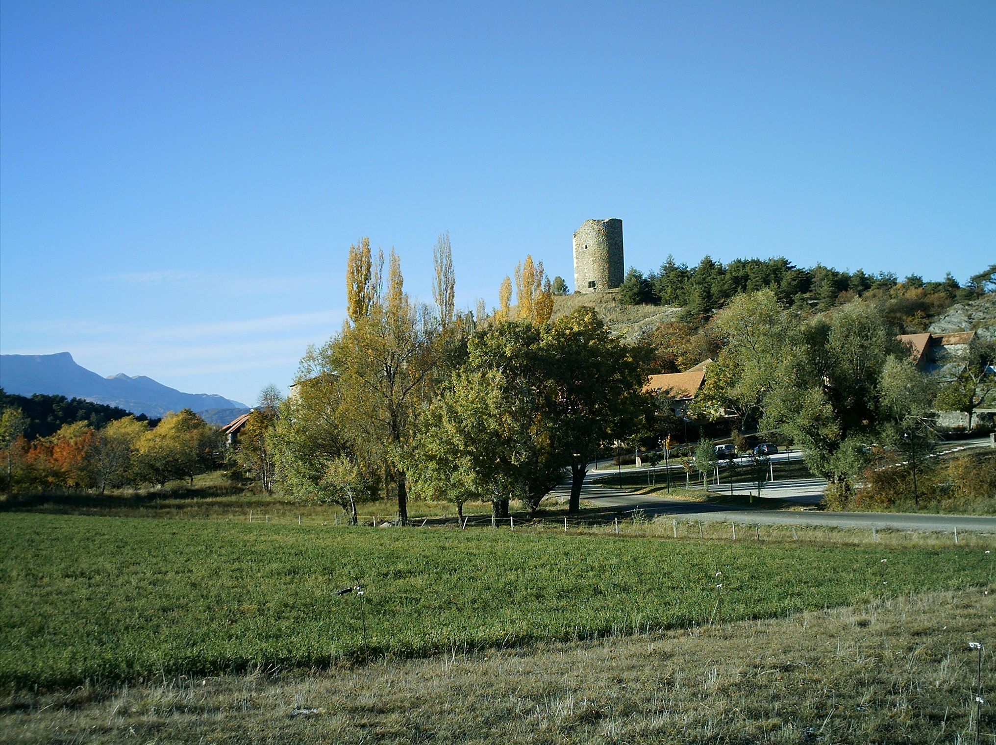 Village de la Batie-Vieille( Hautes-Alpes, France) .